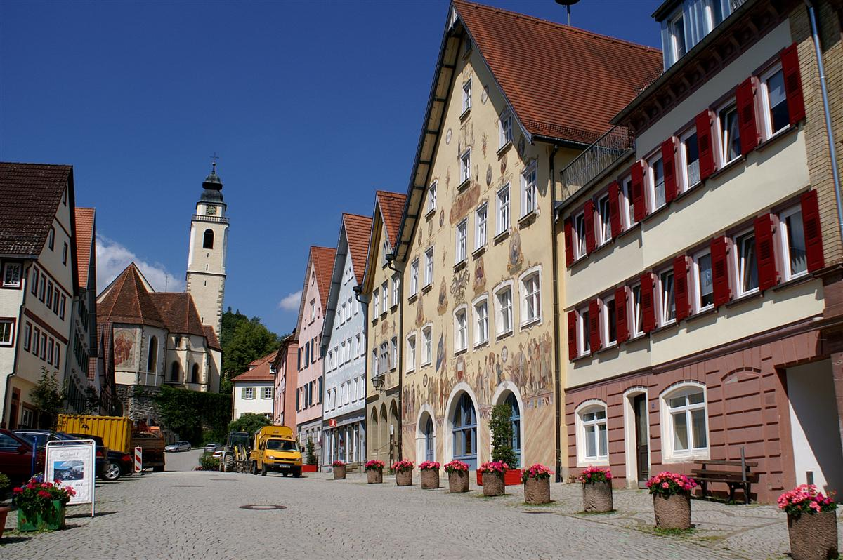 Altstadt mit Stiftskirche